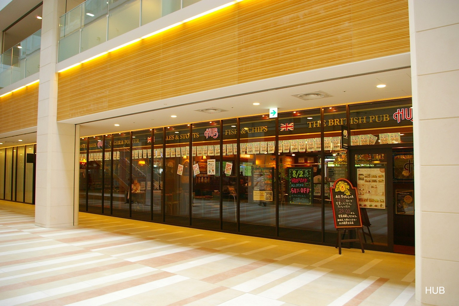 2009.5日本国内で塾生 (talk)が撮影。